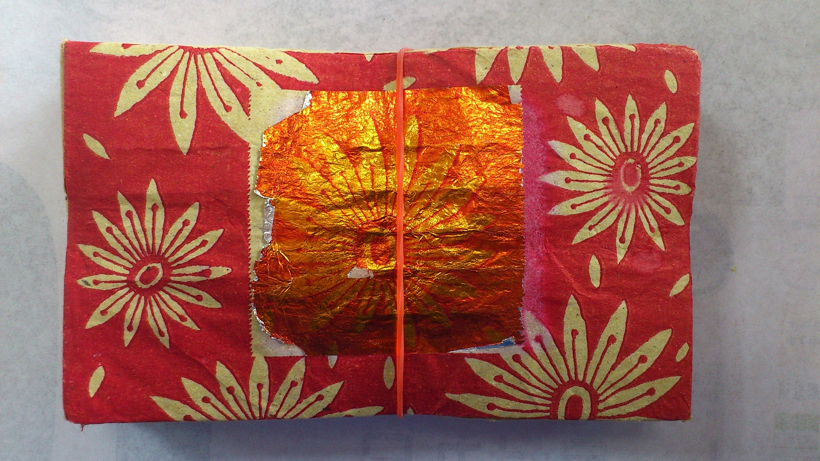 補運錢